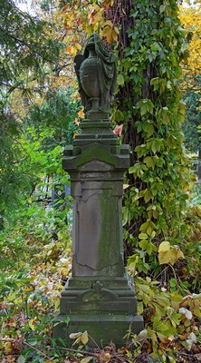 Надгробок на могилі Л. Бодашевського.Личаківський цвинтар , поле № 17.